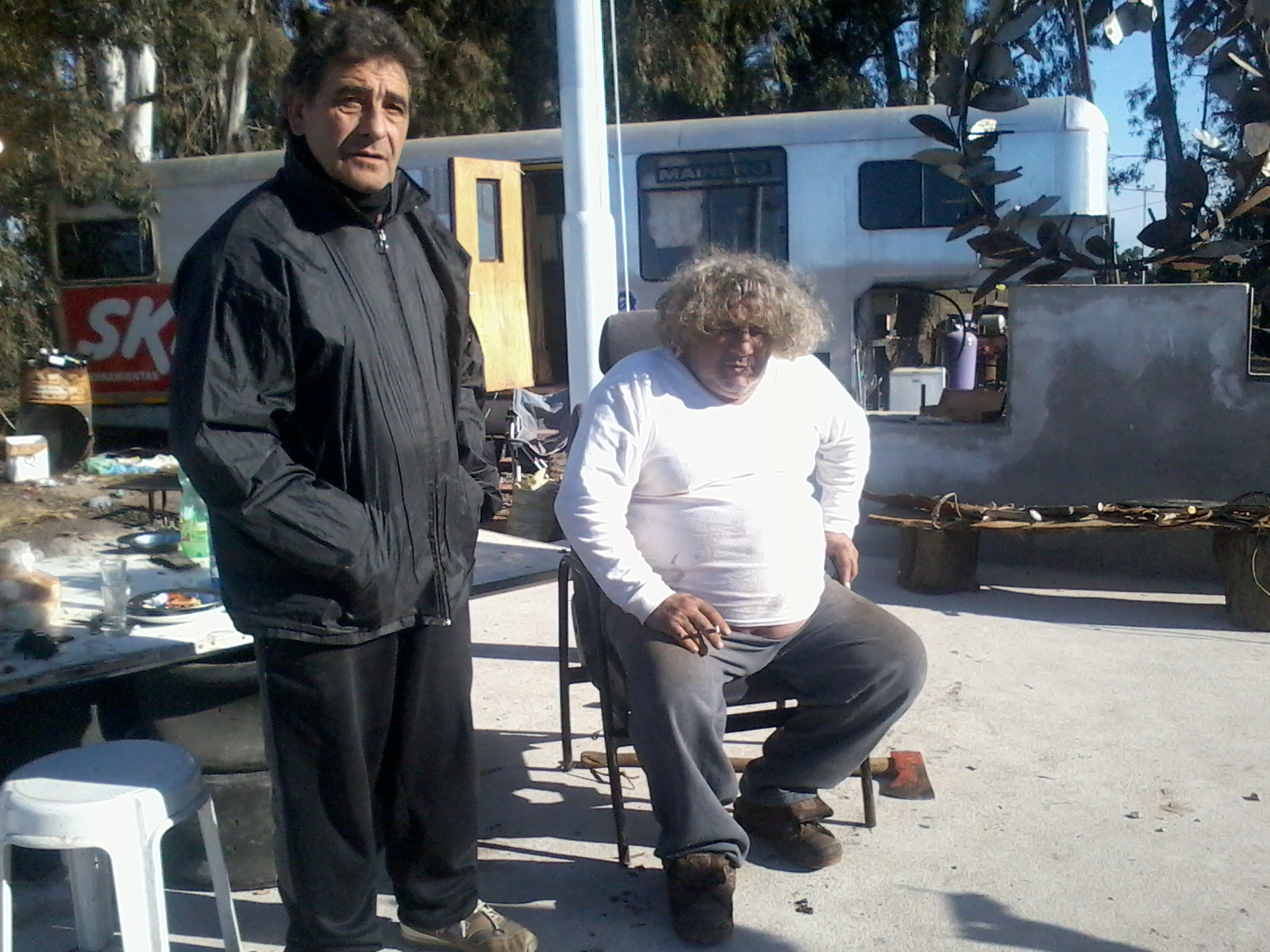 El artista Carlos Regazzoni, con otro artista muy conocido en Balcarce, Giuseppe "Pepino" D'ágata, el mejor lustrador de la zona.